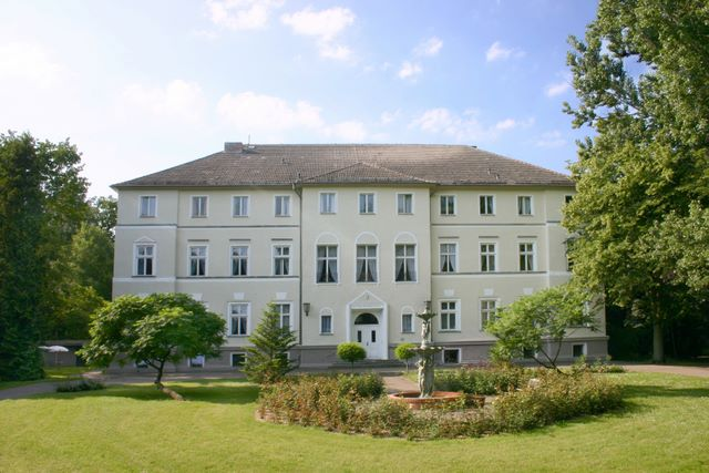 Schloss Ranzin heute